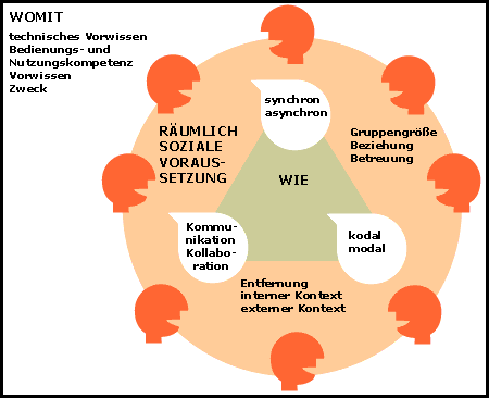 grafische Darstellung netzbasierter Kommunikation, ihrer Voraussetzungen und Bedingungen